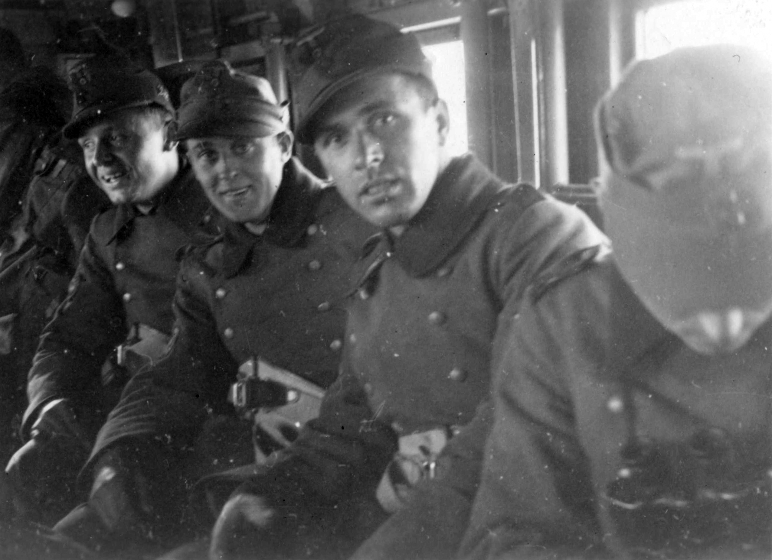 På toget fra Fredrikshavn til København 1940 Tittel / Title: Danmark Dato / Date: 01.05. 1940 Fotograf / Photographer: Karl Marth/Otto Erlacher Sted / Place: Danmark Eier / Owner Institution: Arkiv i Nordland Lenke / Link: Arkiv i Nordland Arkivreferanse /Archive reference: AIN.NA143.0225 Fra Dag Skogheims Privatarkiv Tekst bak på bildet: Fahrt Fredrikshaven- Kopenhagen 01. mai 1940 (Noe uleselig på tysk)